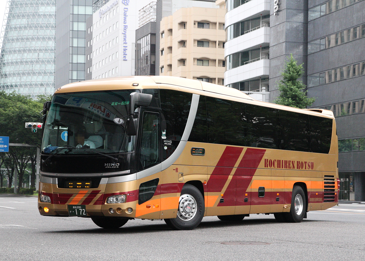 ・登録番号 高知200か･172 ・高知県交通㈱本社営業所所属 ・夜行高速路線用車両 ・2014年6月21日 名古屋中区にて撮影 ・撮影者 Zondag2000